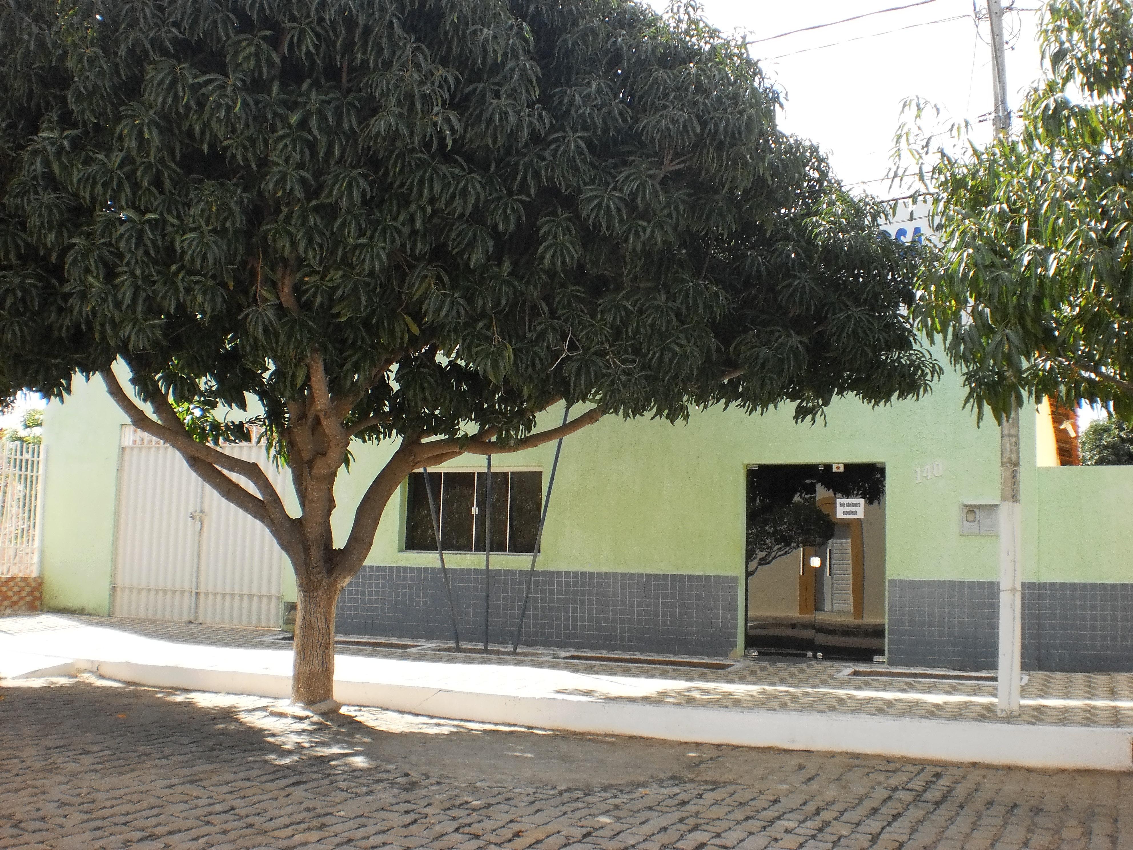 Prefeitura Municipal de Viçosa, Rio Grande do Norte, Brasil.